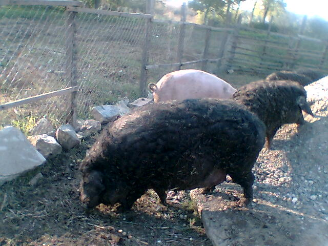 Мангалица